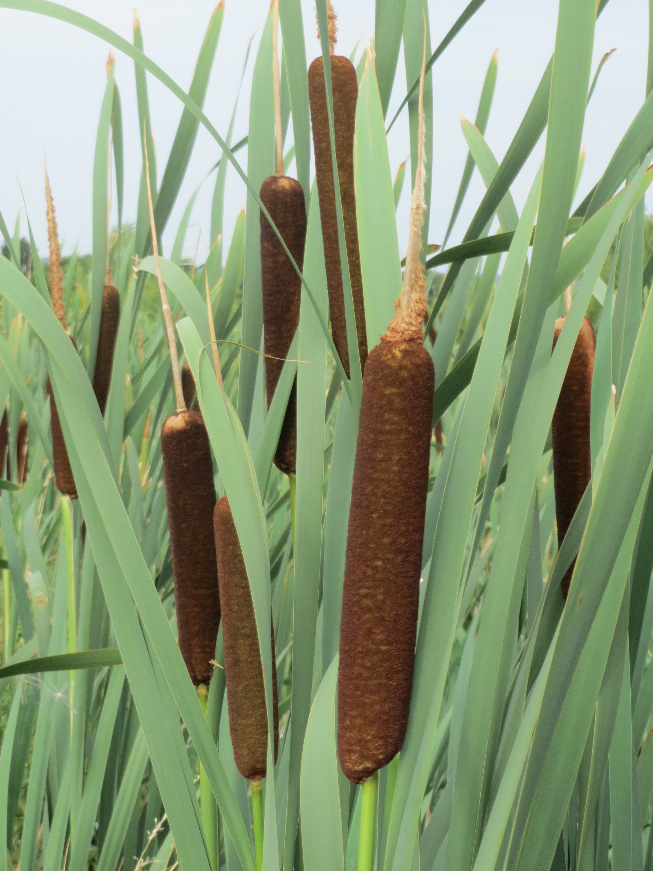 Breitblättriger Rohrkolben (Typha latifolia) bei Wiesbaden-Nordenstadt